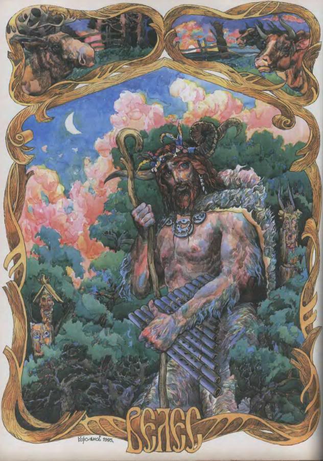 Старослов'янських бог домашніх тварин